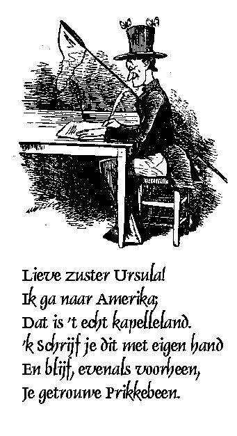 Een tekening uit 1840. De tekst is door mijzelf gezet. Auteur gestorven in 1889: Jan Goeverneur